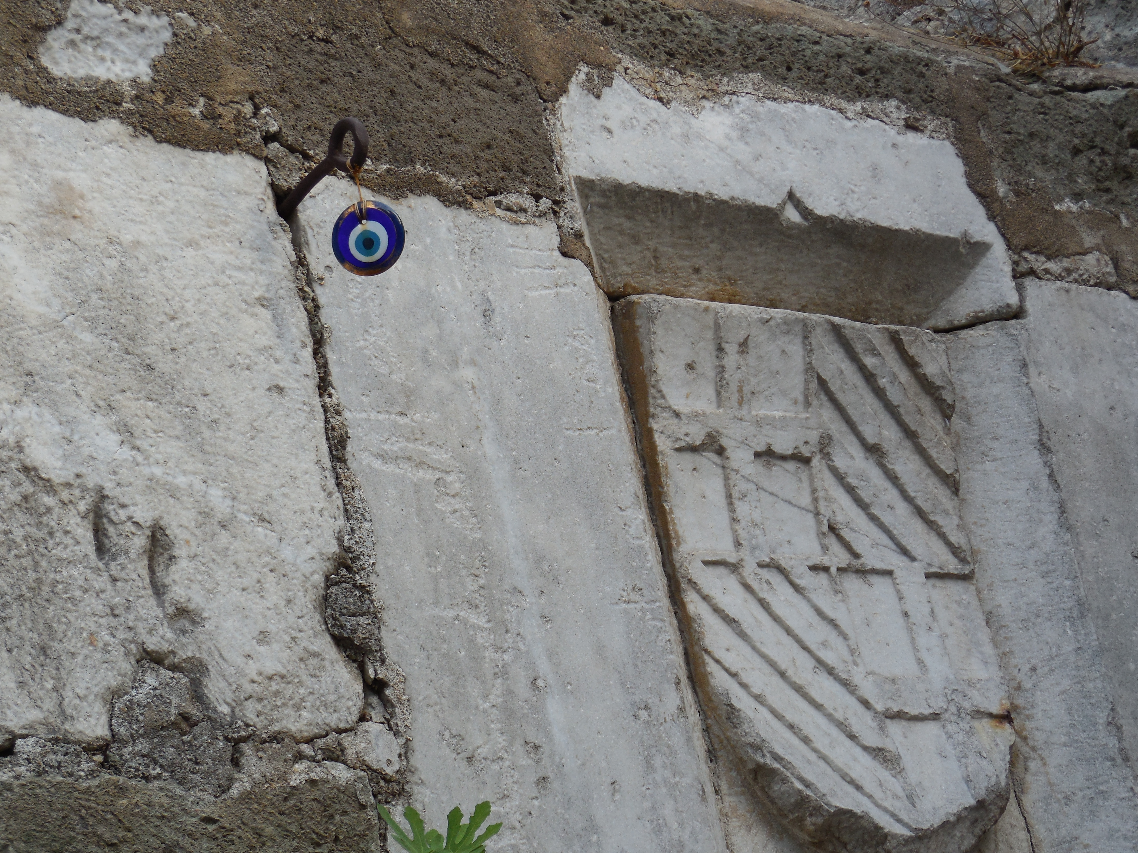 Bodrum